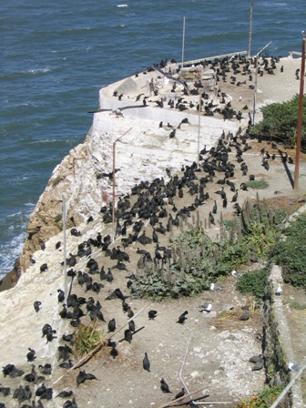 Alcatraz Island cormoran